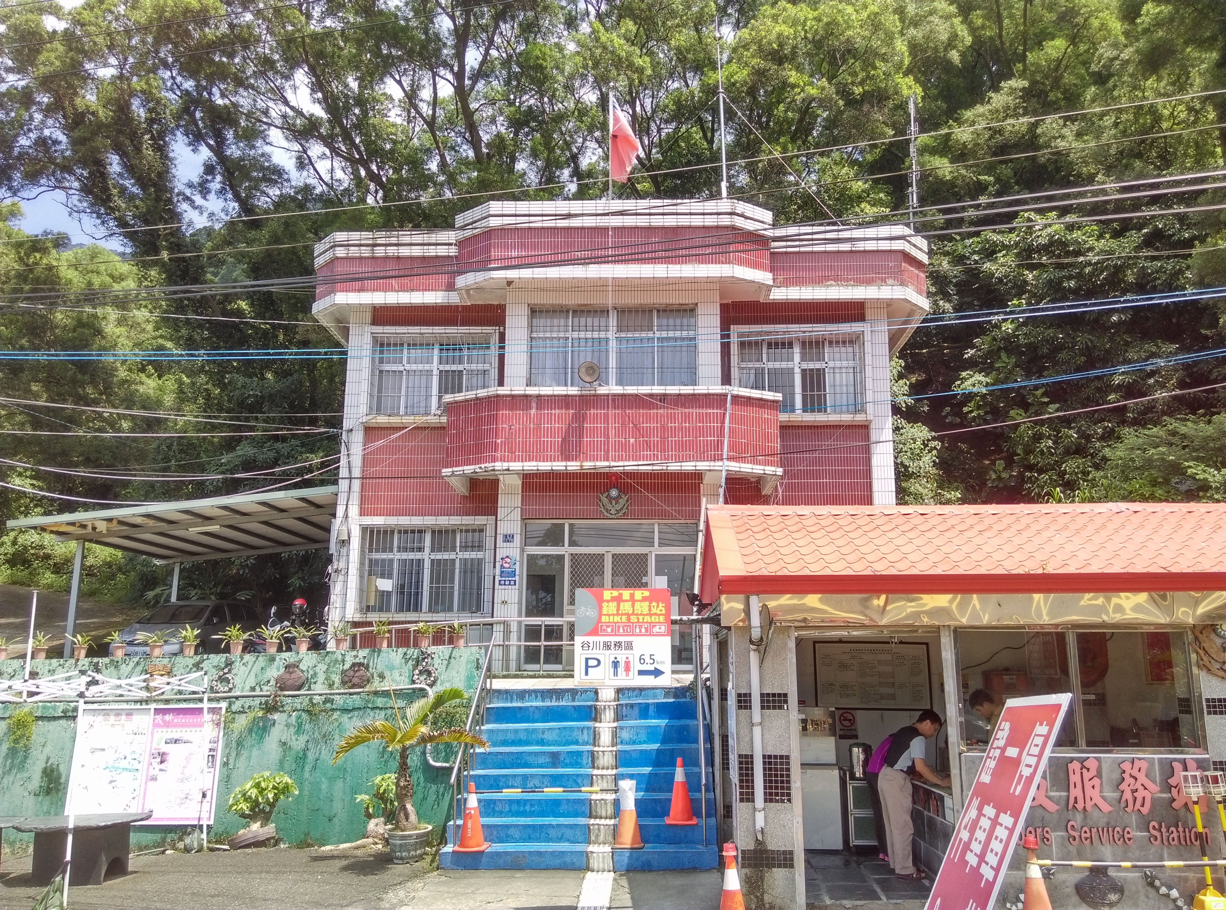 位於台灣屏東縣三地門鄉的三德檢查所，坐落於台24線26.5公里處。